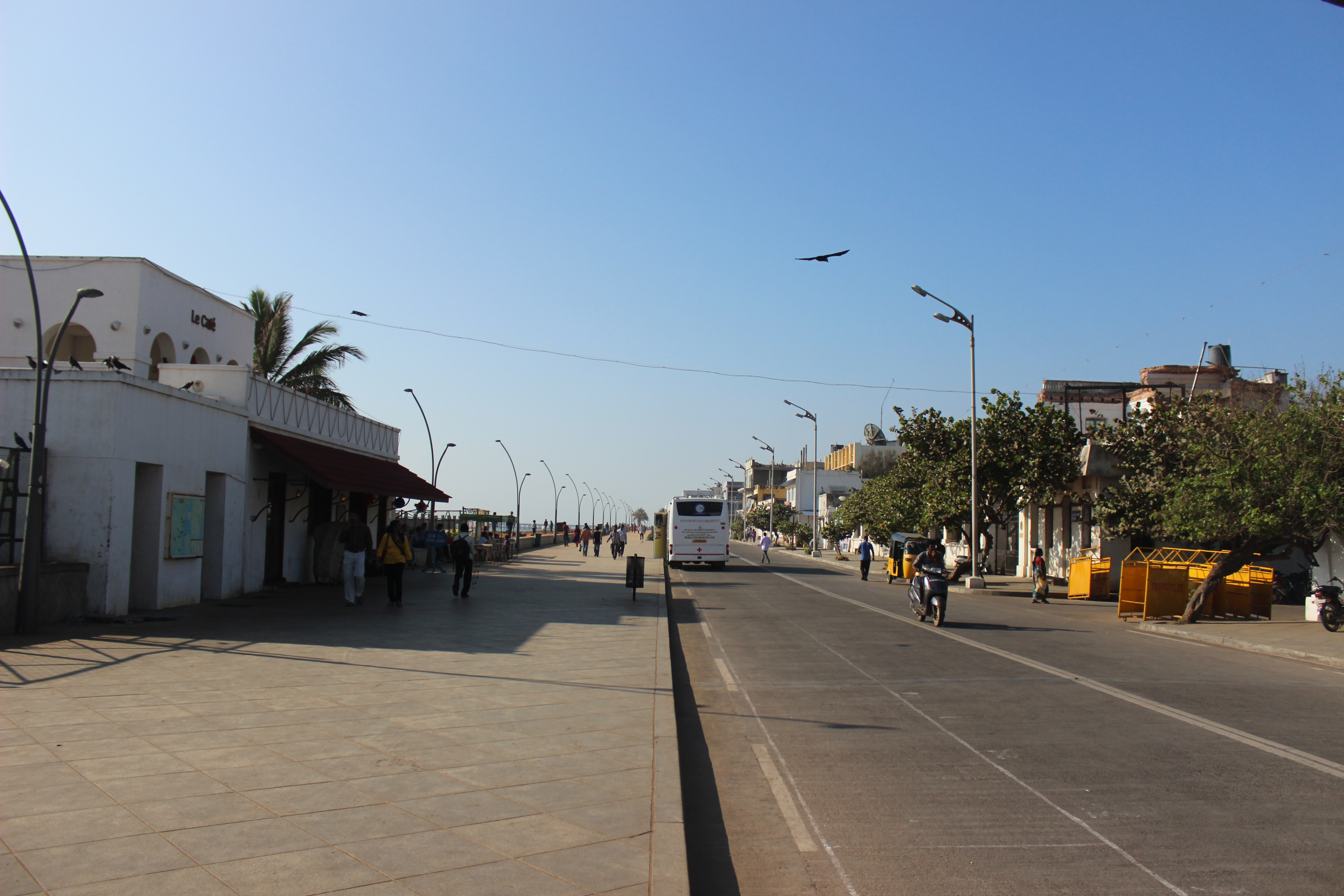 புதுச்சேரி கடற்கரைச் சாலை